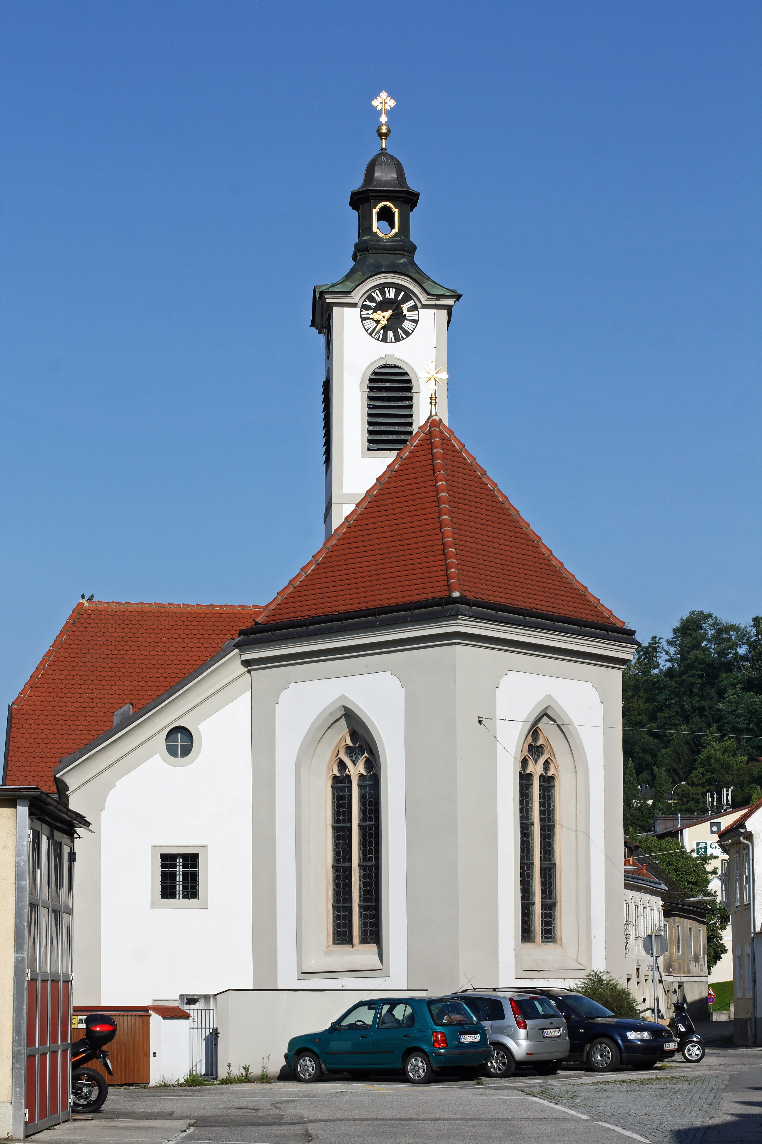 Die Steyrer Bruderhauskirche von der Sierningerstraße aus gesehen